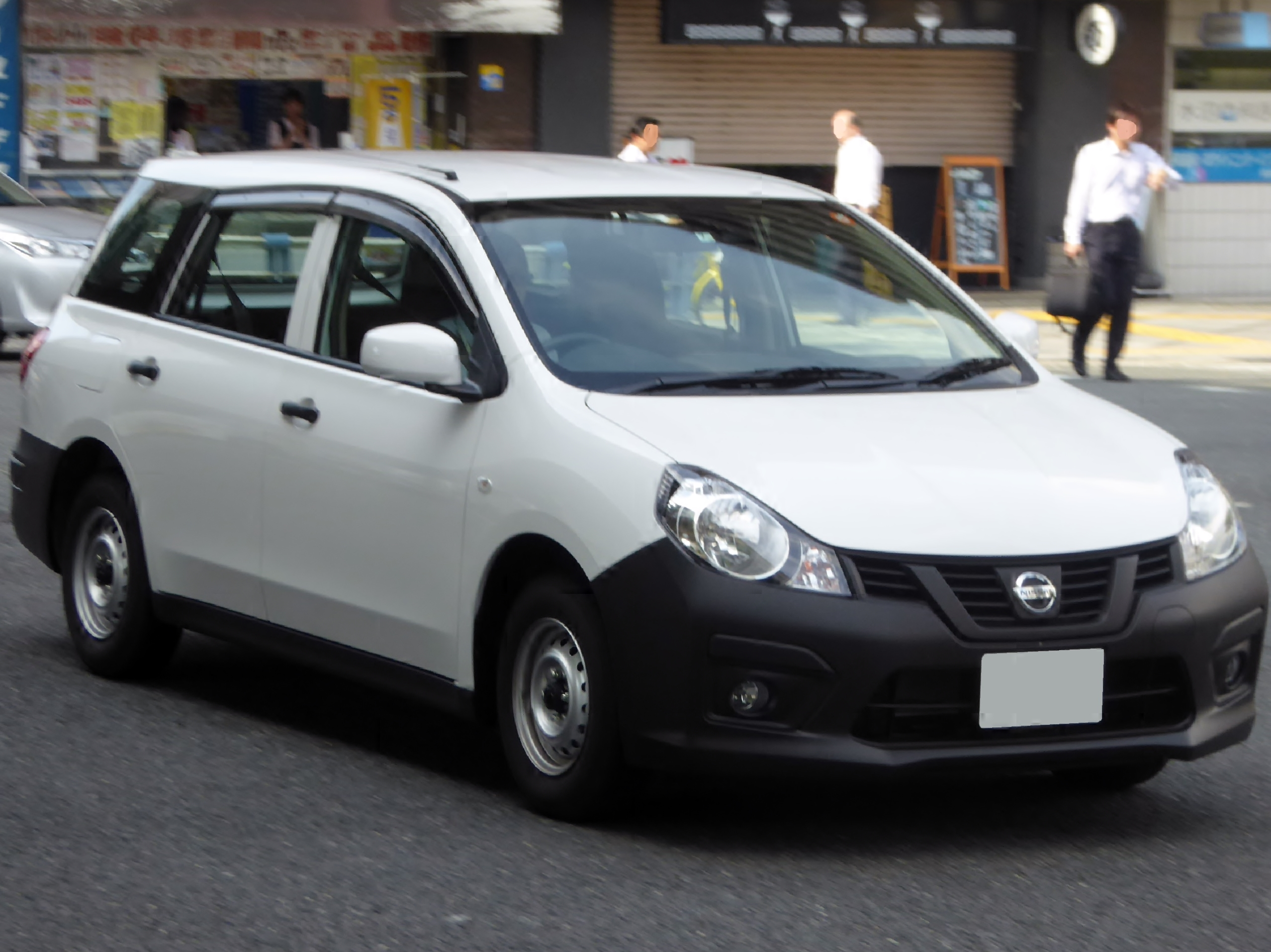 DBF-VY12型日産・NV150AD DXを撮影。